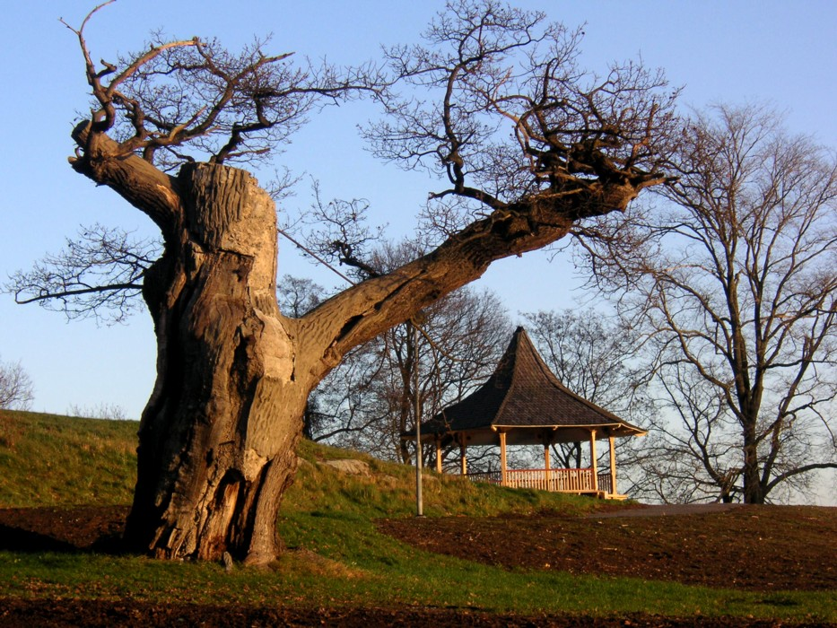 Alte Eichen, typisch für den Nationalstadtpark